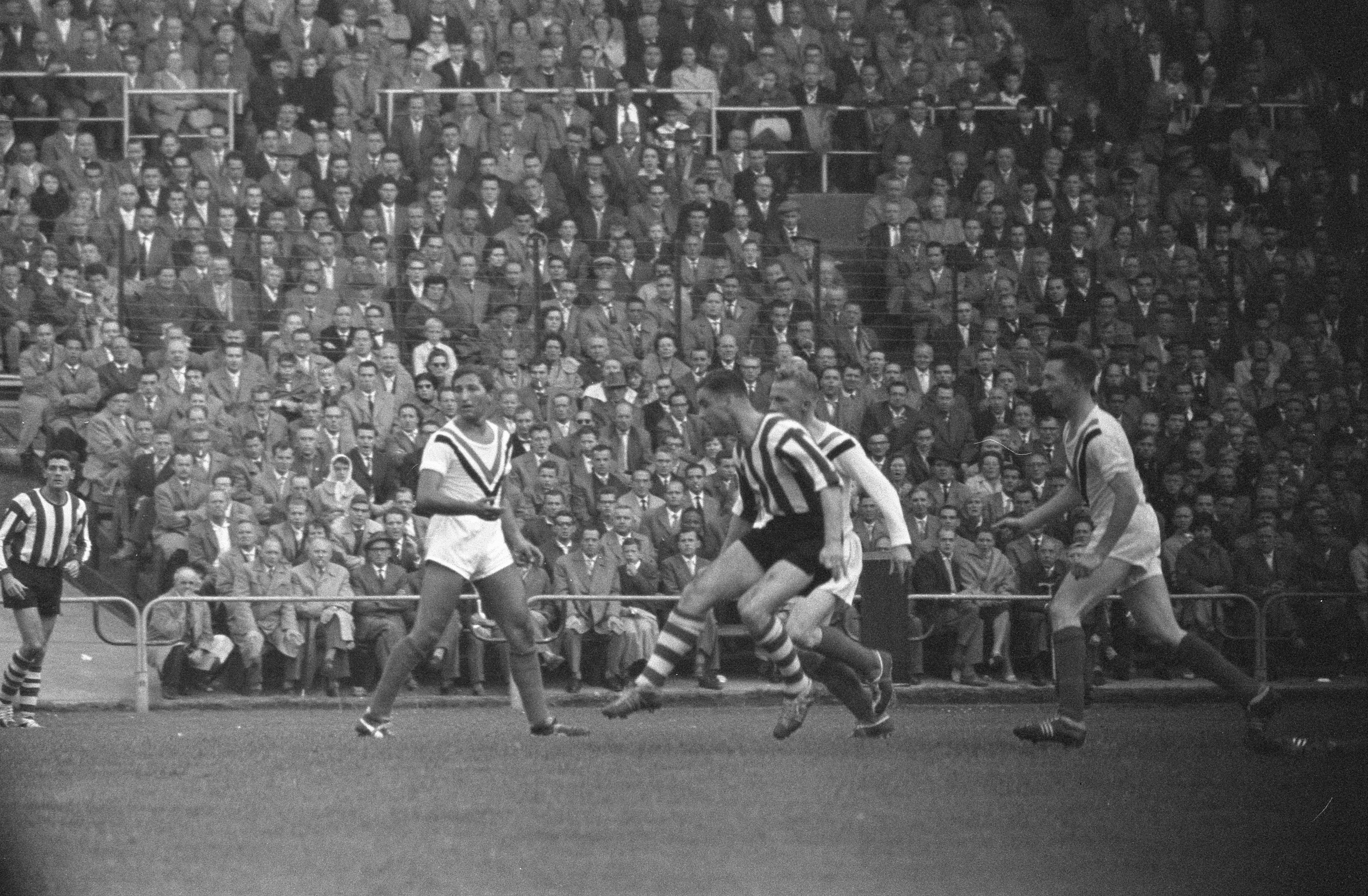 Collectie / Archief : Fotocollectie Anefo Reportage / Serie : [ onbekend ] Beschrijving : DWS tegen PSV 2-5 Datum : 11 oktober 1959 Instellingsnaam : PSV Fotograaf : Rossem, Wim van / Anefo Auteursrechthebbende : Nationaal Archief Materiaalsoort : Negatief (zwart/wit) Nummer archiefinventaris : bekijk toegang 2.24.01.05 Bestanddeelnummer : 910-7361